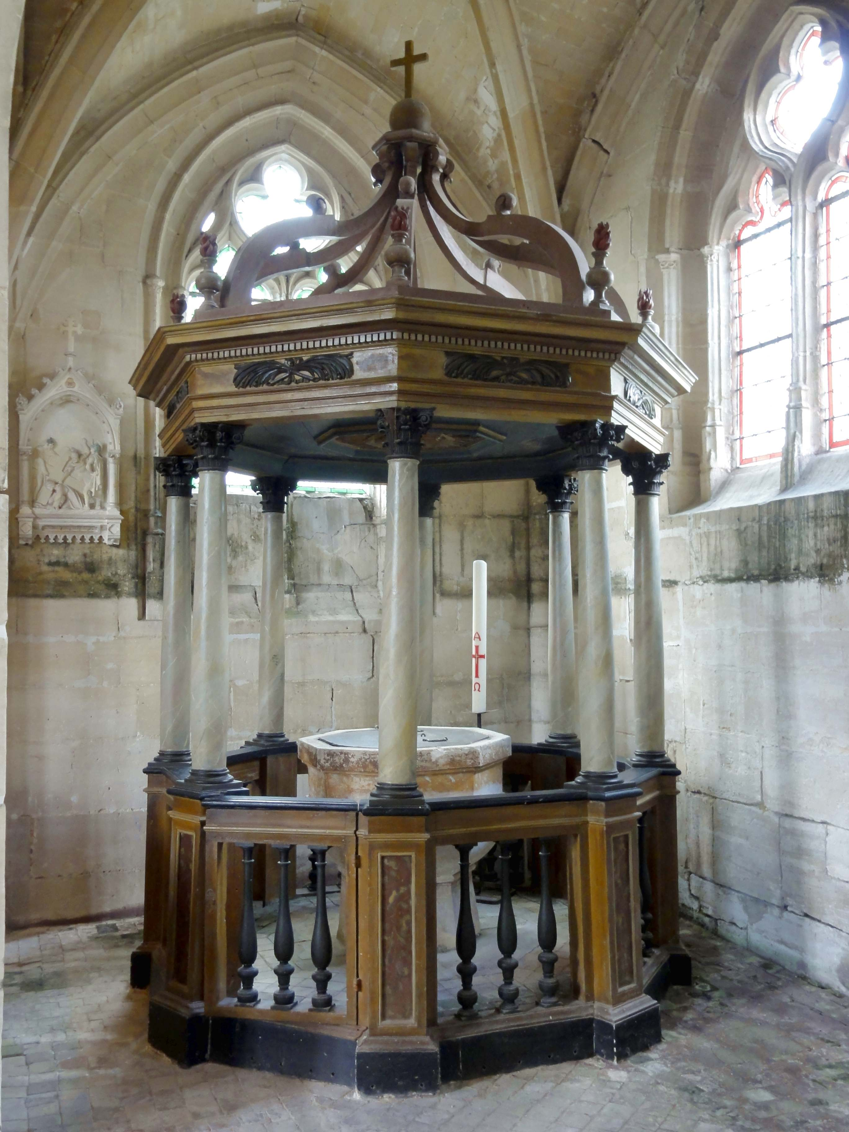 Mobilier de l'église - voir le titre du fichier.